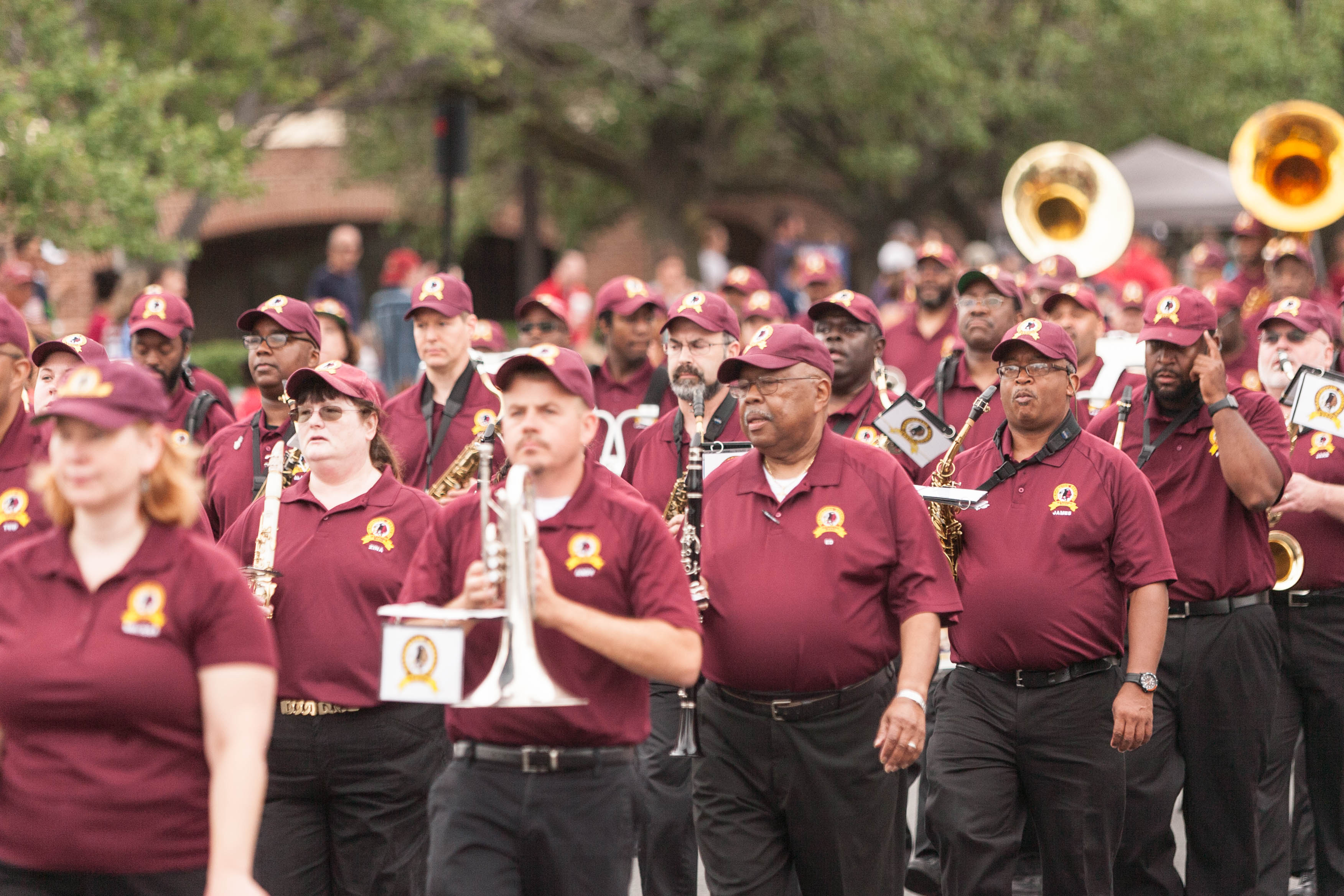 QD3J0125.jpg